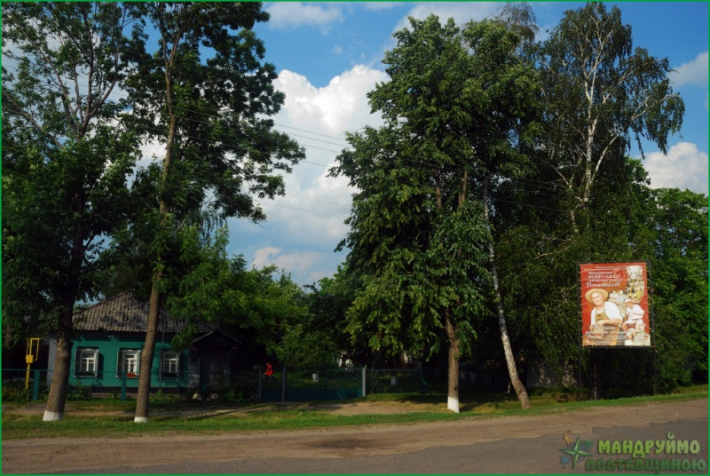 Меморіальна садиба-музей гончарської родини Пошивайлів., Опішня, вул. Заливчого, 63